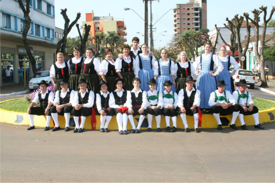 alemaes em xaxim